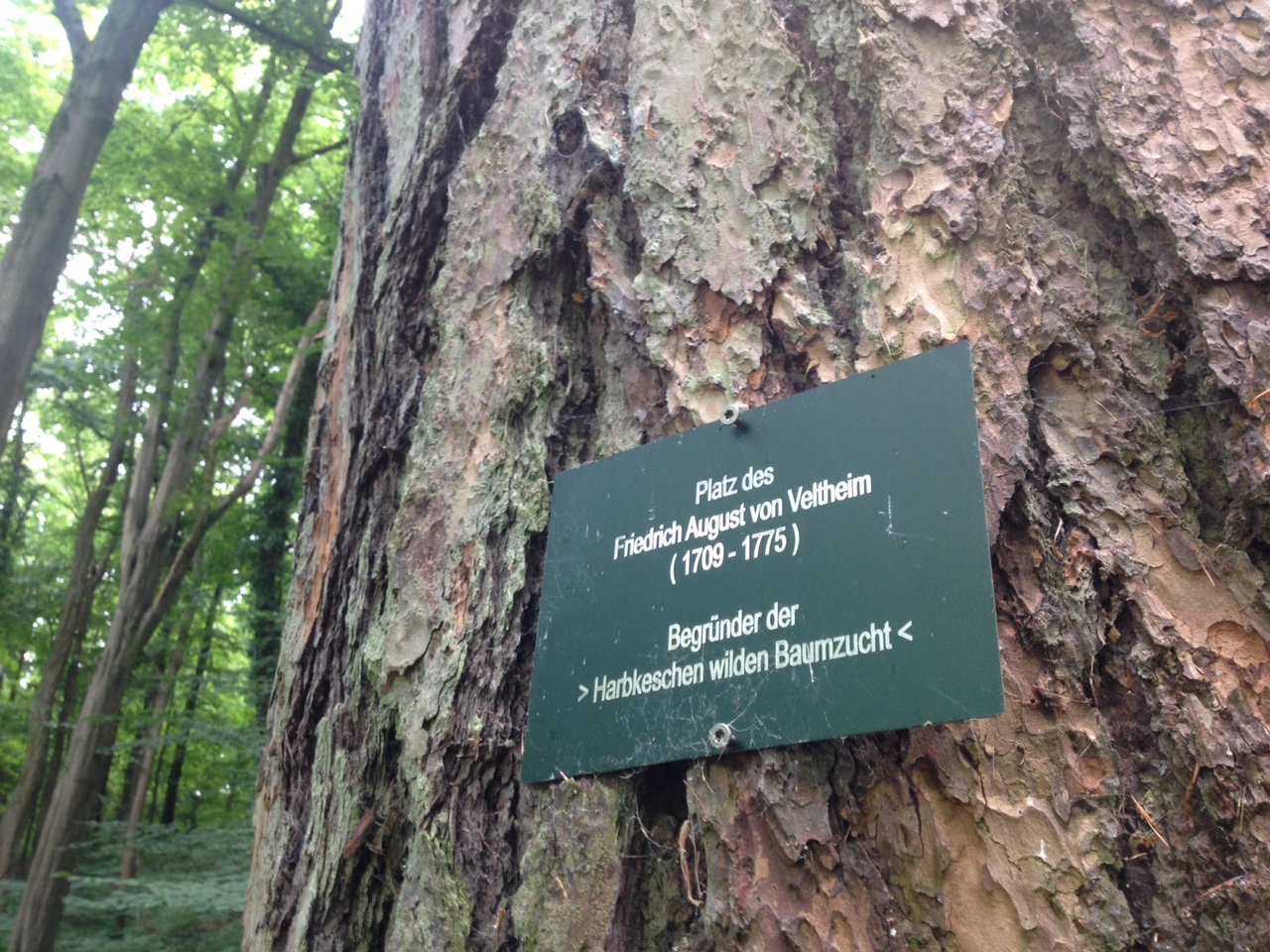 Gedenktafel für Friedrich August von Veltheim an einer alten Lärche im Lustwald.